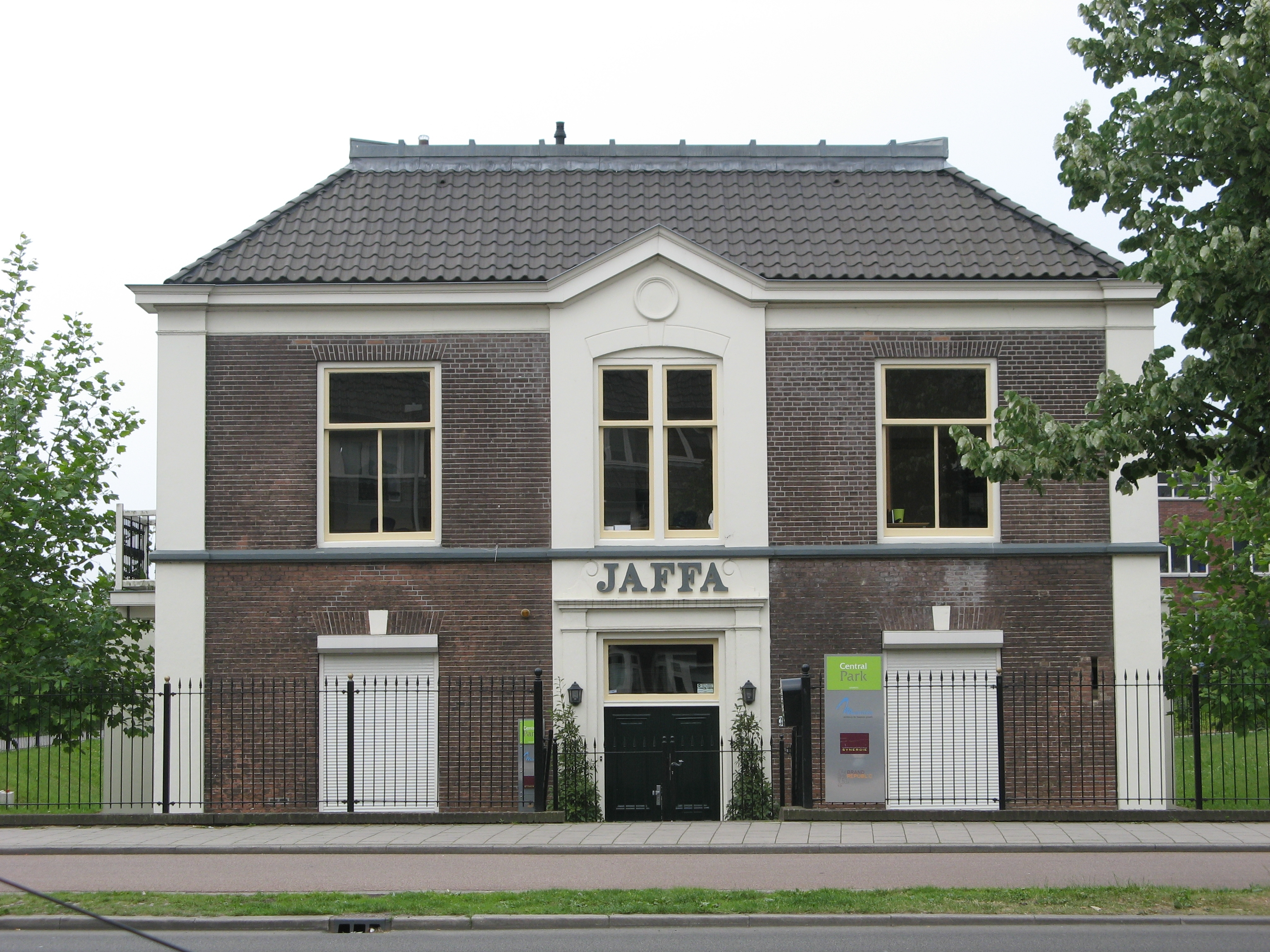 Villa Jaffa uit 1880, Vleutenseweg 382. Gemeentelijk monument